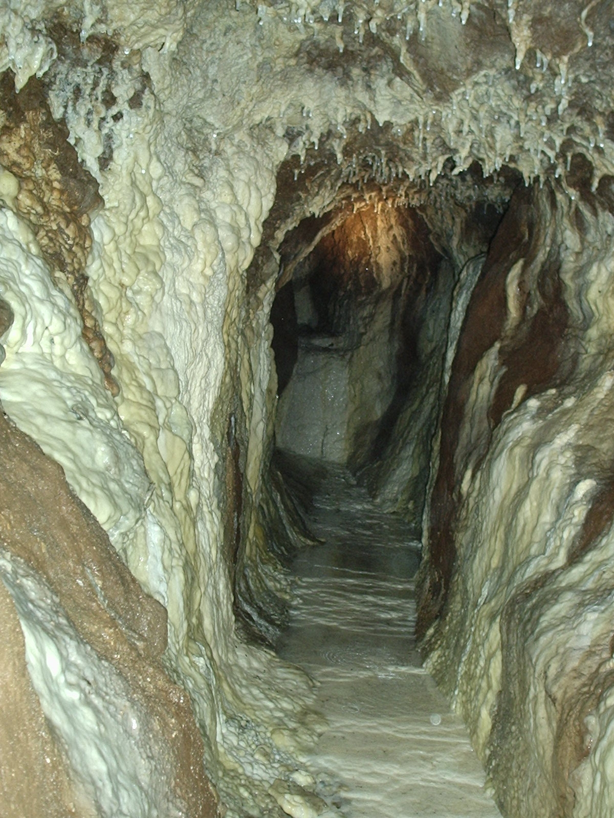 ramo dell'acquedotto di epoca romana, che alimenta il fonte Helvius, collocato in piazza G.B. Ferrajoli di Sant'Egidio del Monte Albino (Salerno)